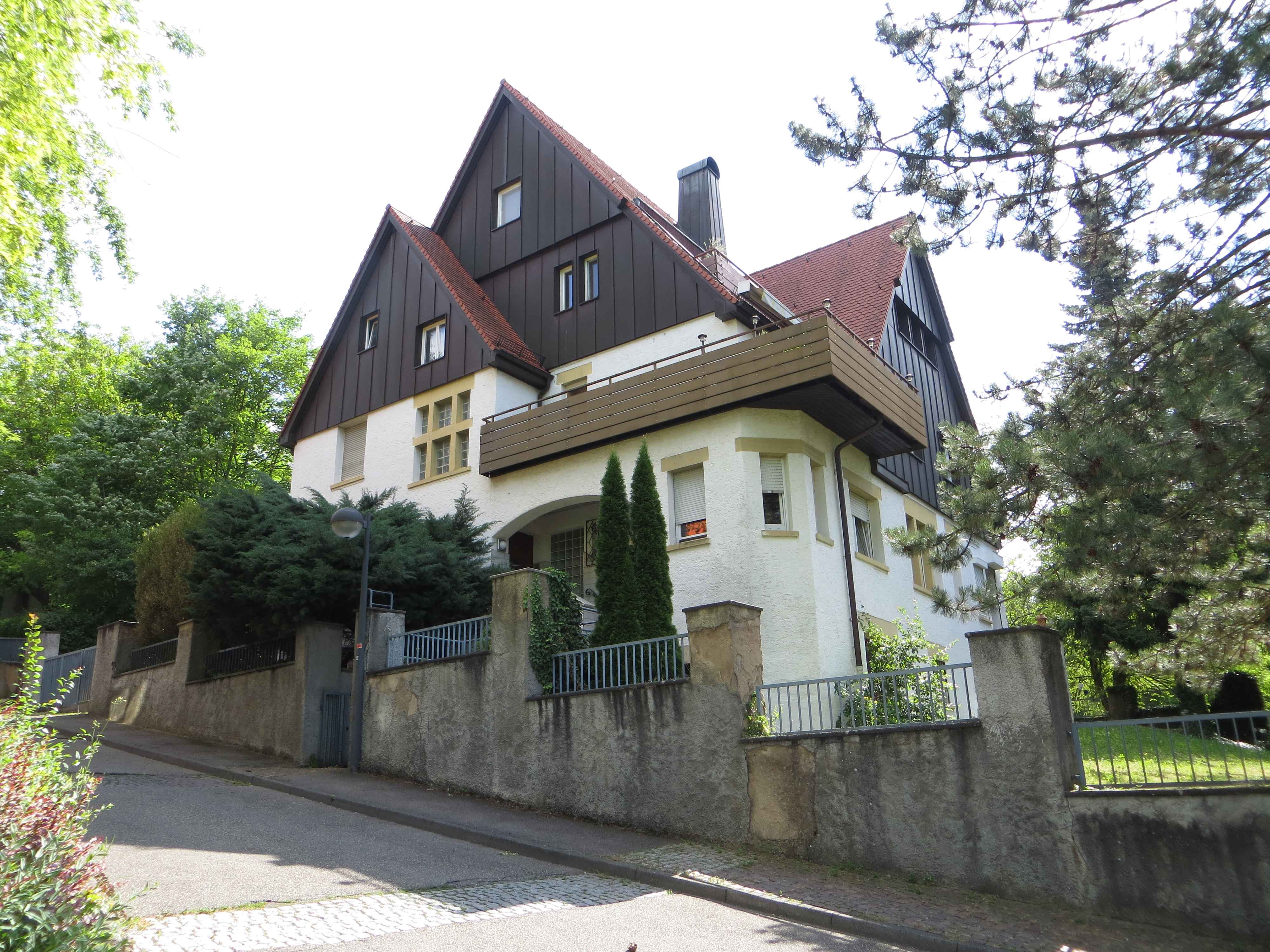 Das Haus Eugen Seitz an der Hildtstraße 7 in Weinsberg. Erbaut 1907 für Eugen Seitz von Oberamtsbaumeister Schmauk und den Heilbronner Architekten Beutinger & Steiner.